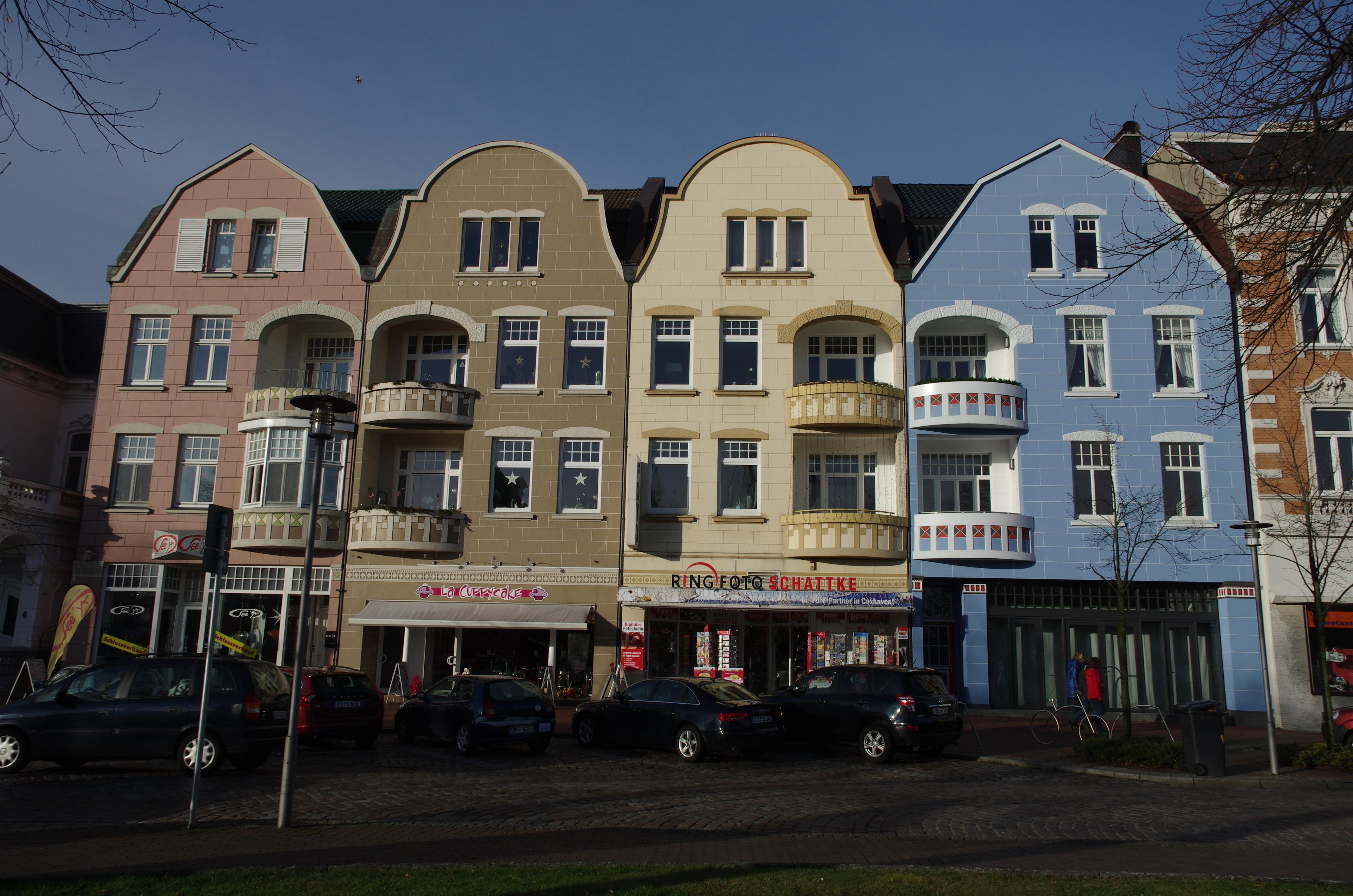 Cuxhaven in Niedersachsen. Die Häuser Deichstraße, 5, 6, 7 und 8 befinden sich unter Denkmalschutz.